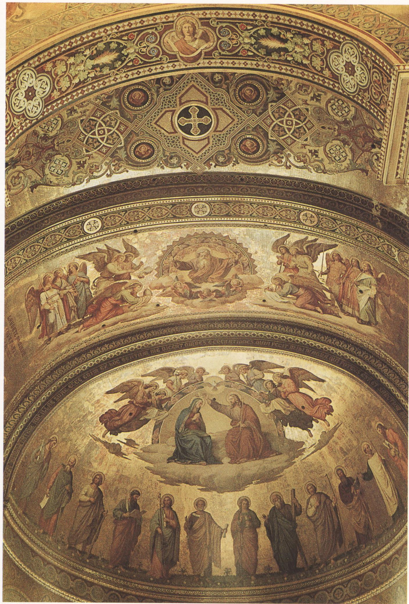 Johann von Schraudolph, zerstörte Apsismalerei im Speyerer Dom